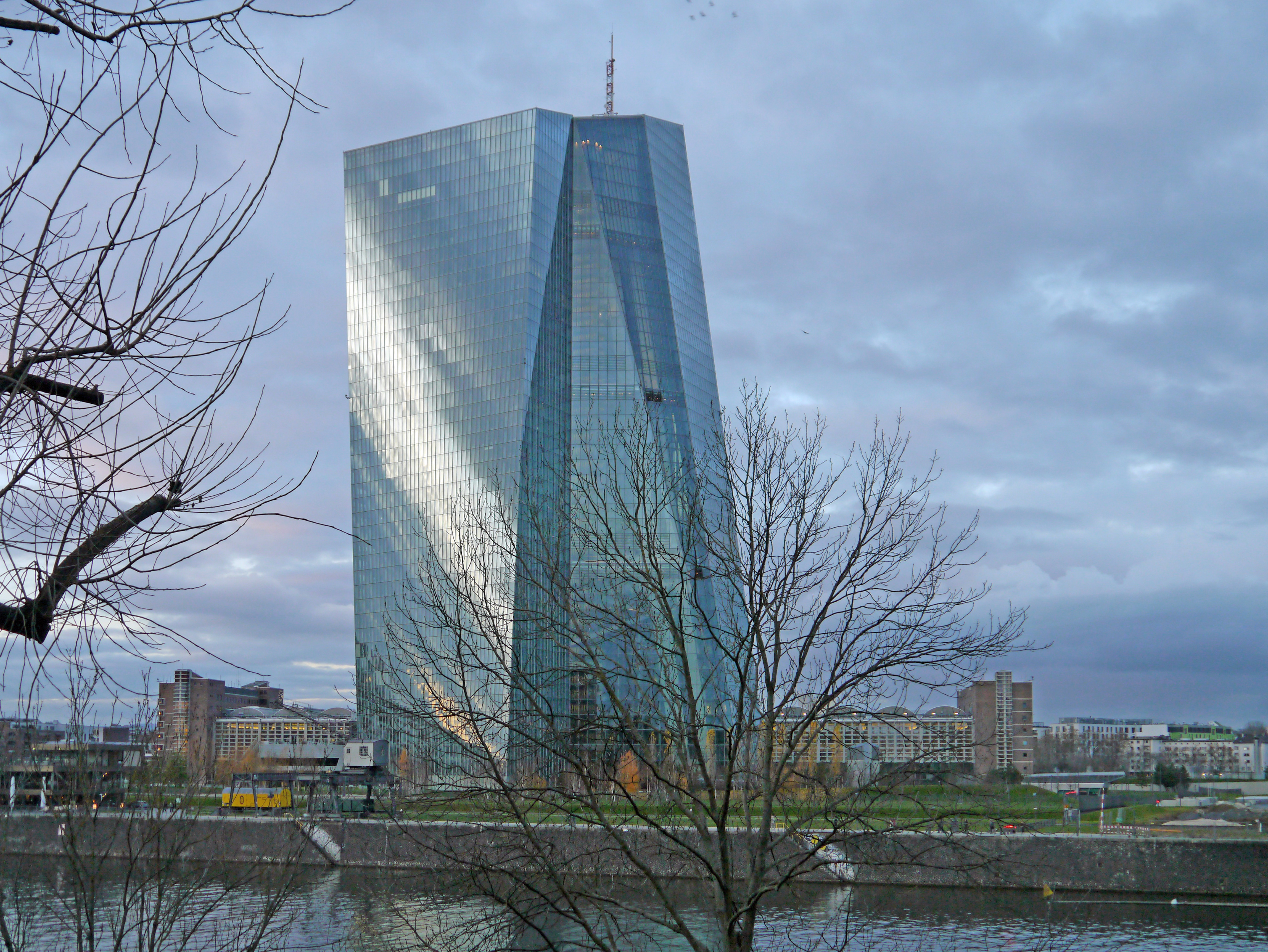 Die EZB-Hauptverwaltungsrückseite, 2016 von der Deutschherrnbrücke.